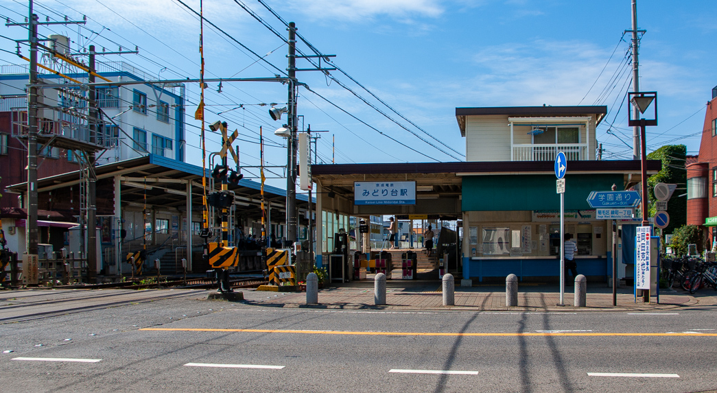 京成電鉄株式会社京成千葉線みどり台駅